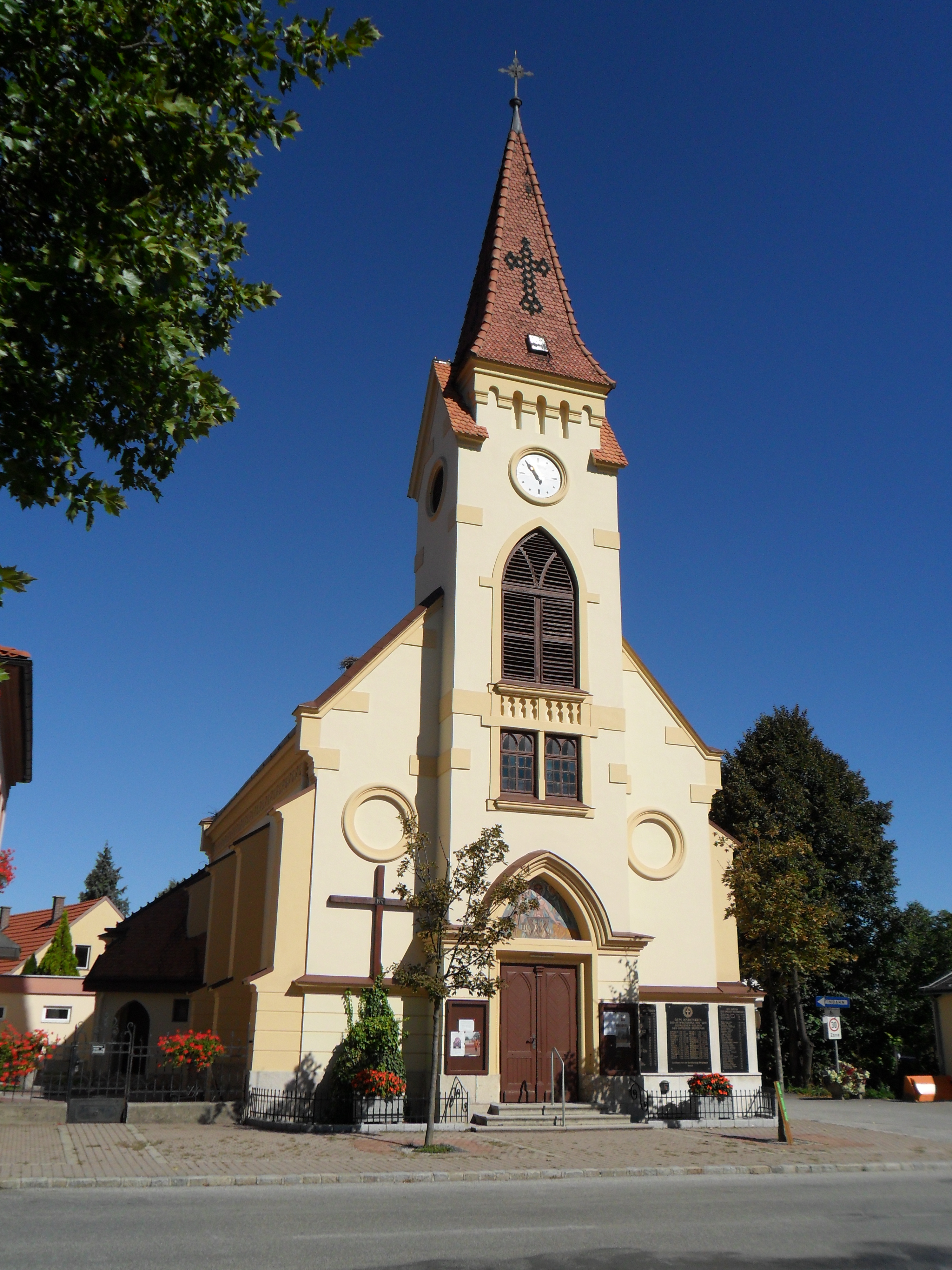 Kath. Filialkirche hl. Veit in Breitenau (Niederösterreich)